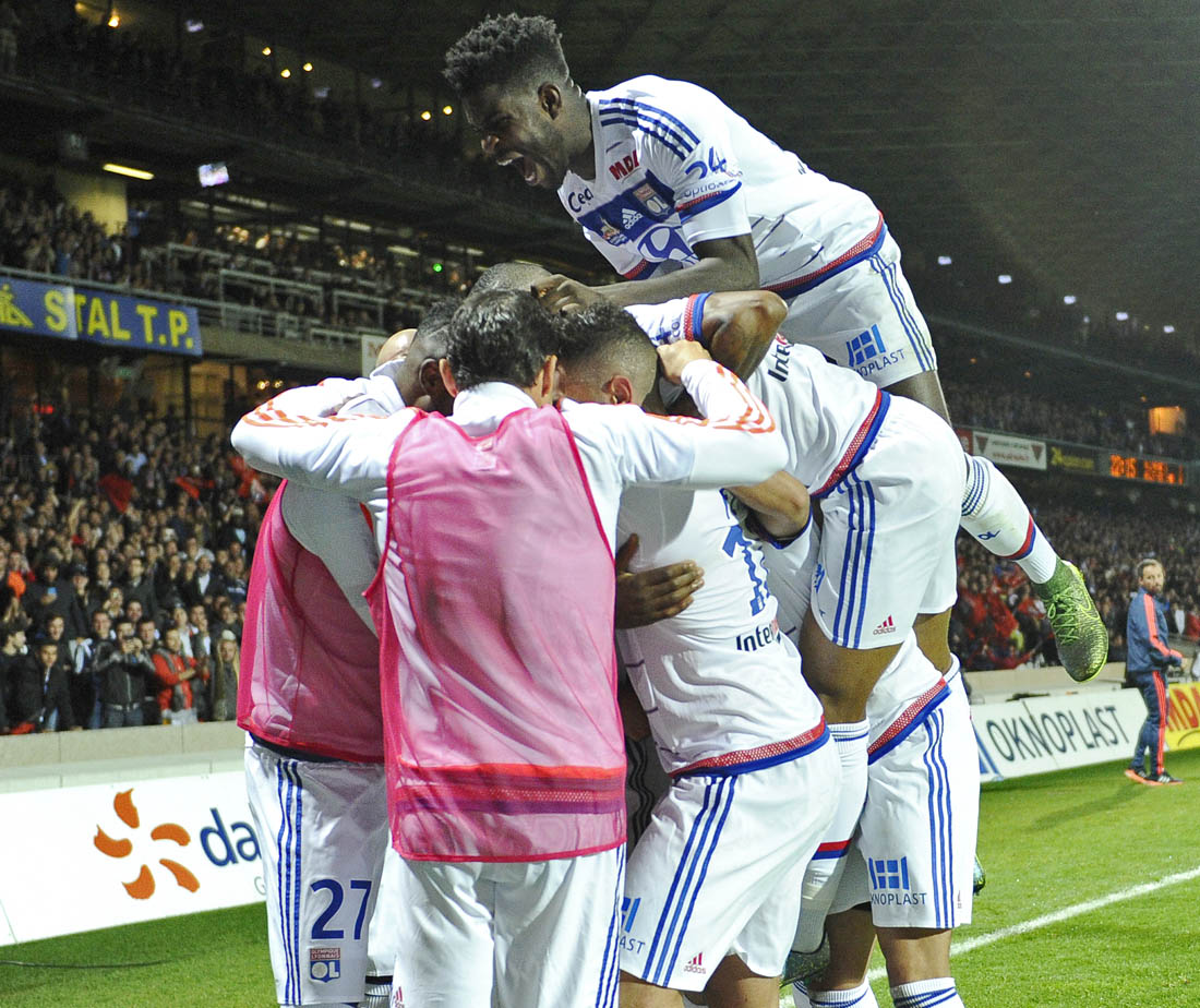 Victoire